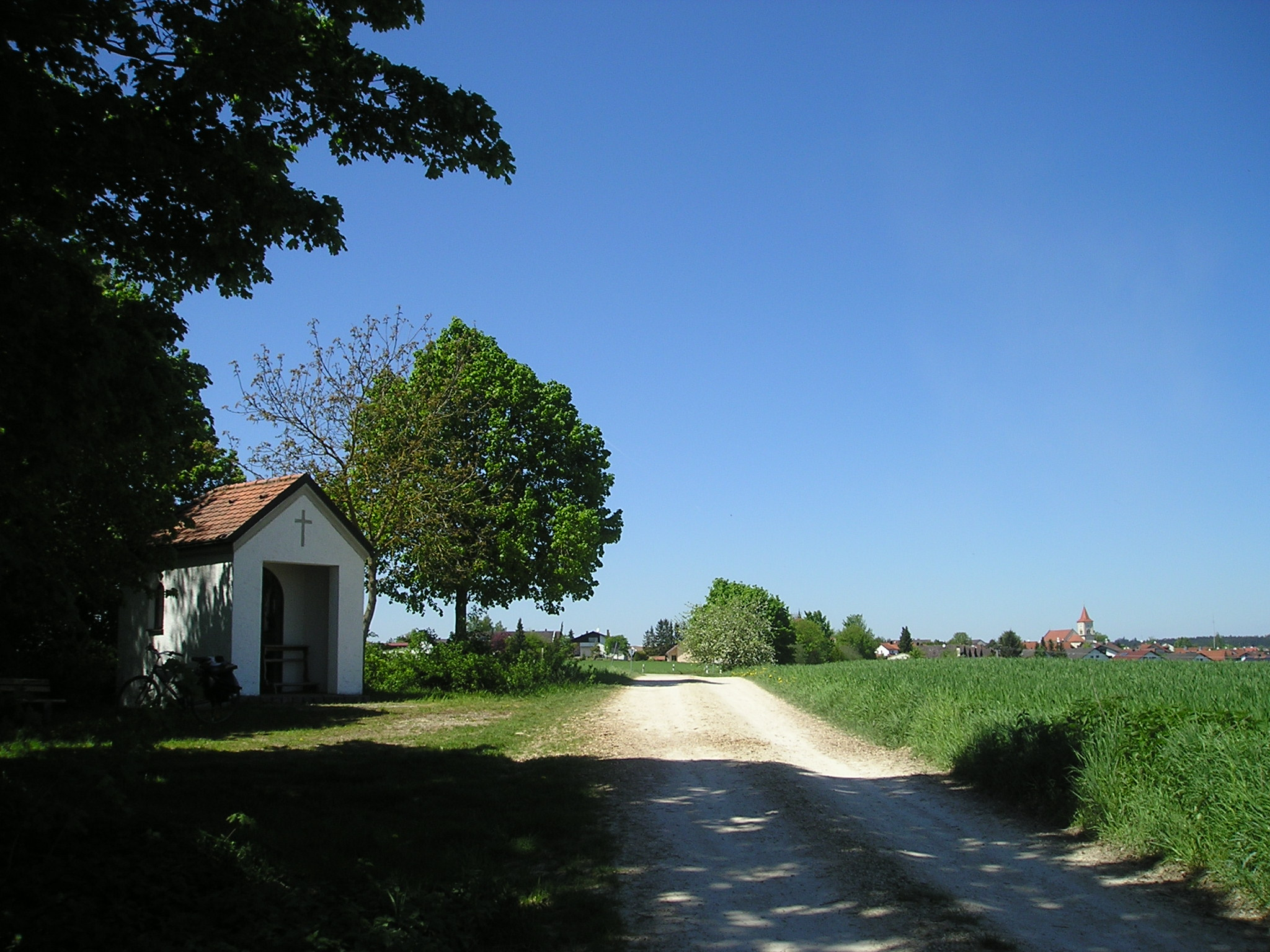 Wickenzell-Kapelle bei Rupertsbuch, Landkreis Eichstätt